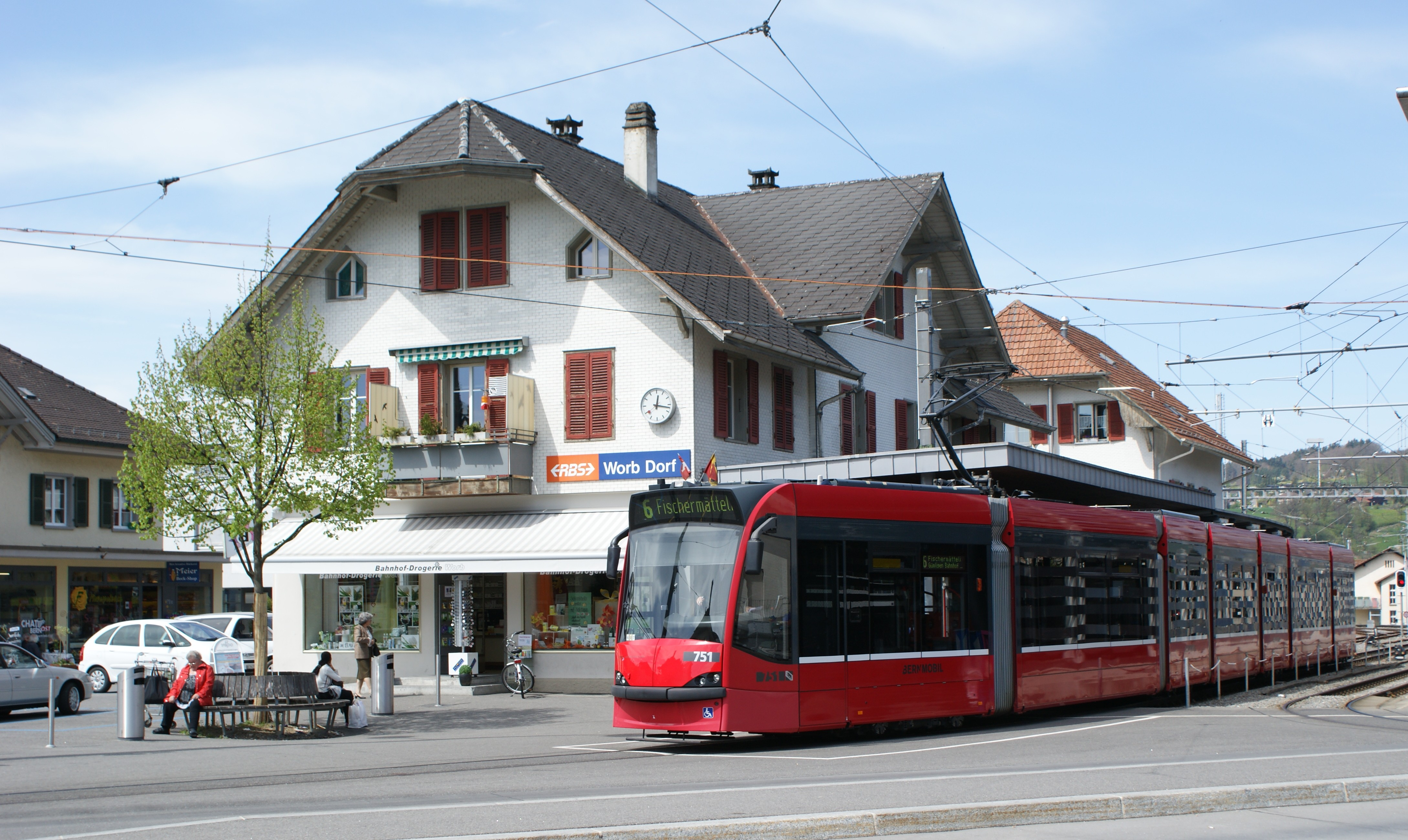 SVB Bernmobil Be 6/8 751 auf der Linie 6 ist soeben in Worb Dorf abgefahren und befährt zunächst die Wendeschleife um dann nach Bern zu fahren.